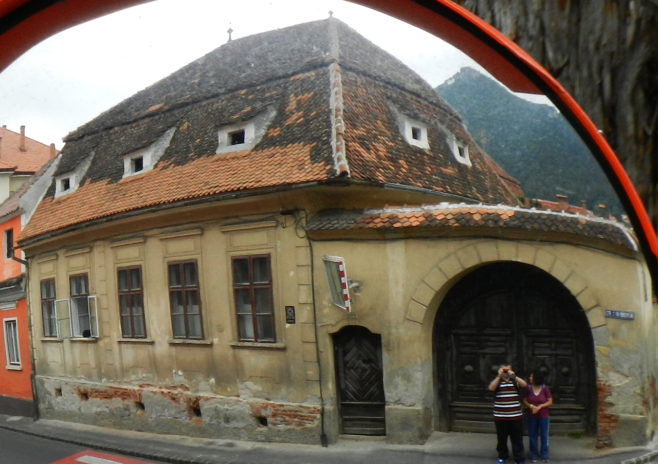 Casă monument istoric